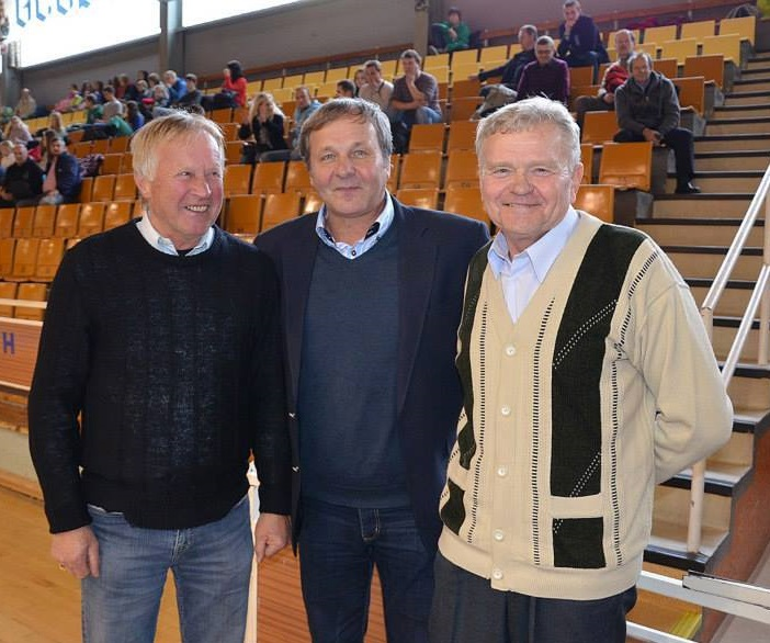 MAF 2013